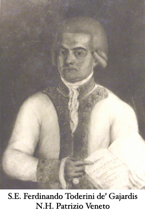 Ritratto di S.E. Ferdinando Toderini de' Gajardis, Patrizio Veneto (1727-1797 ca.)